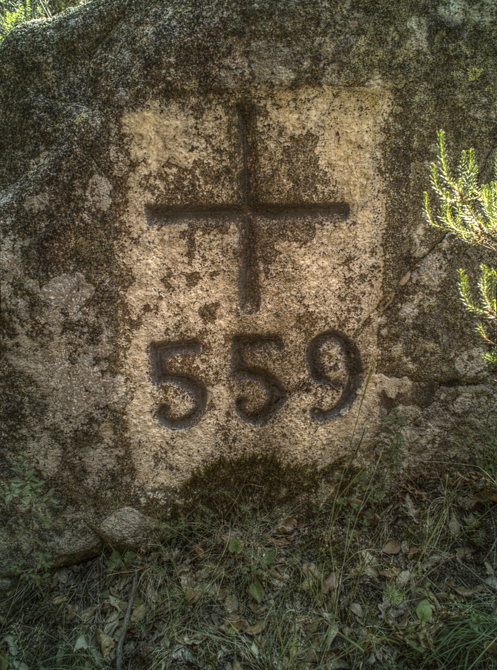 Croix-frontière n° 559, Col de Manrella, Maureillas-La-Illas (Pyrénées-Orientales, Languedoc-Roussillon, France), Agullana (Haut-Ampurdan, Gérone, Catalogne, Espagne)